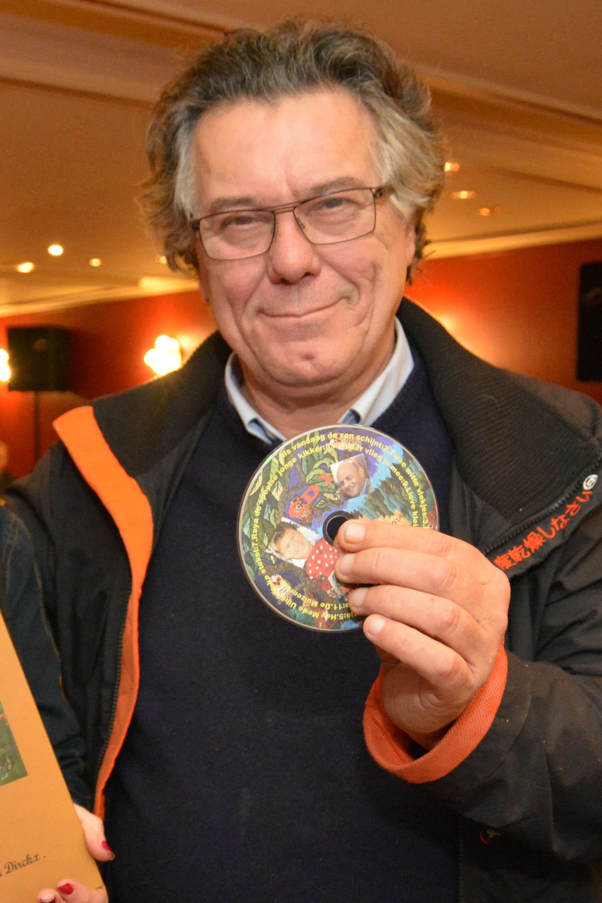 Johan Verminnen tijdens een persvoorstelling van een nieuwe CD in 2014